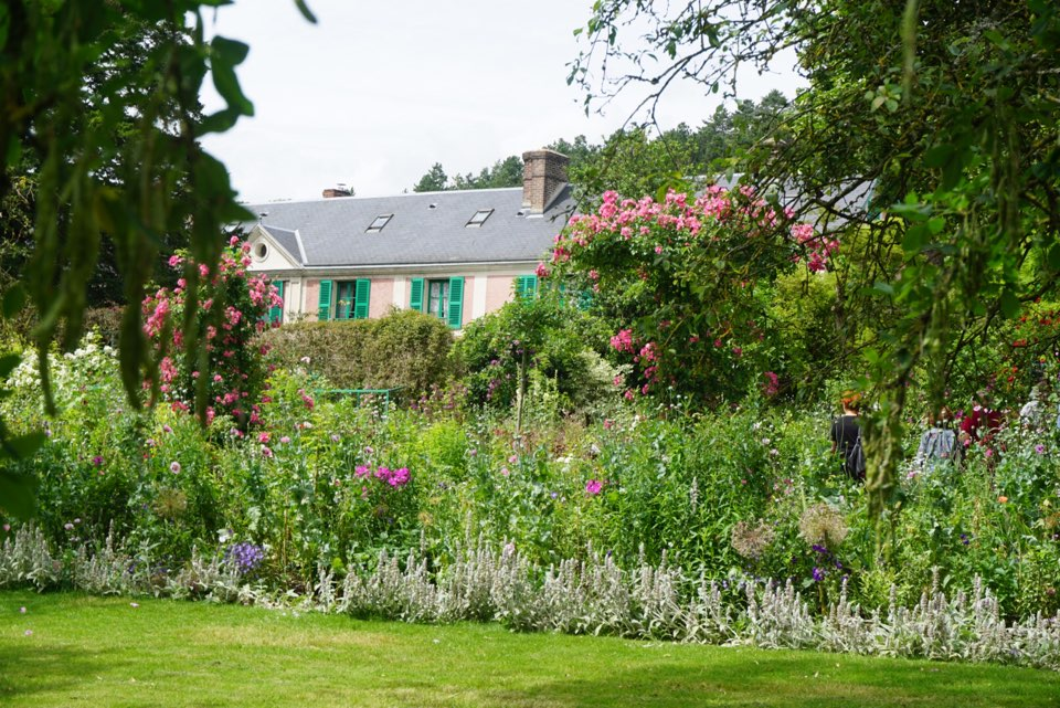 프랑스 파리 외각이 위치한 도시 지베르니로, 화가 모네의 작품인 의 실제 모델인 모네의 정원이 있는 곳으로 유명하다.